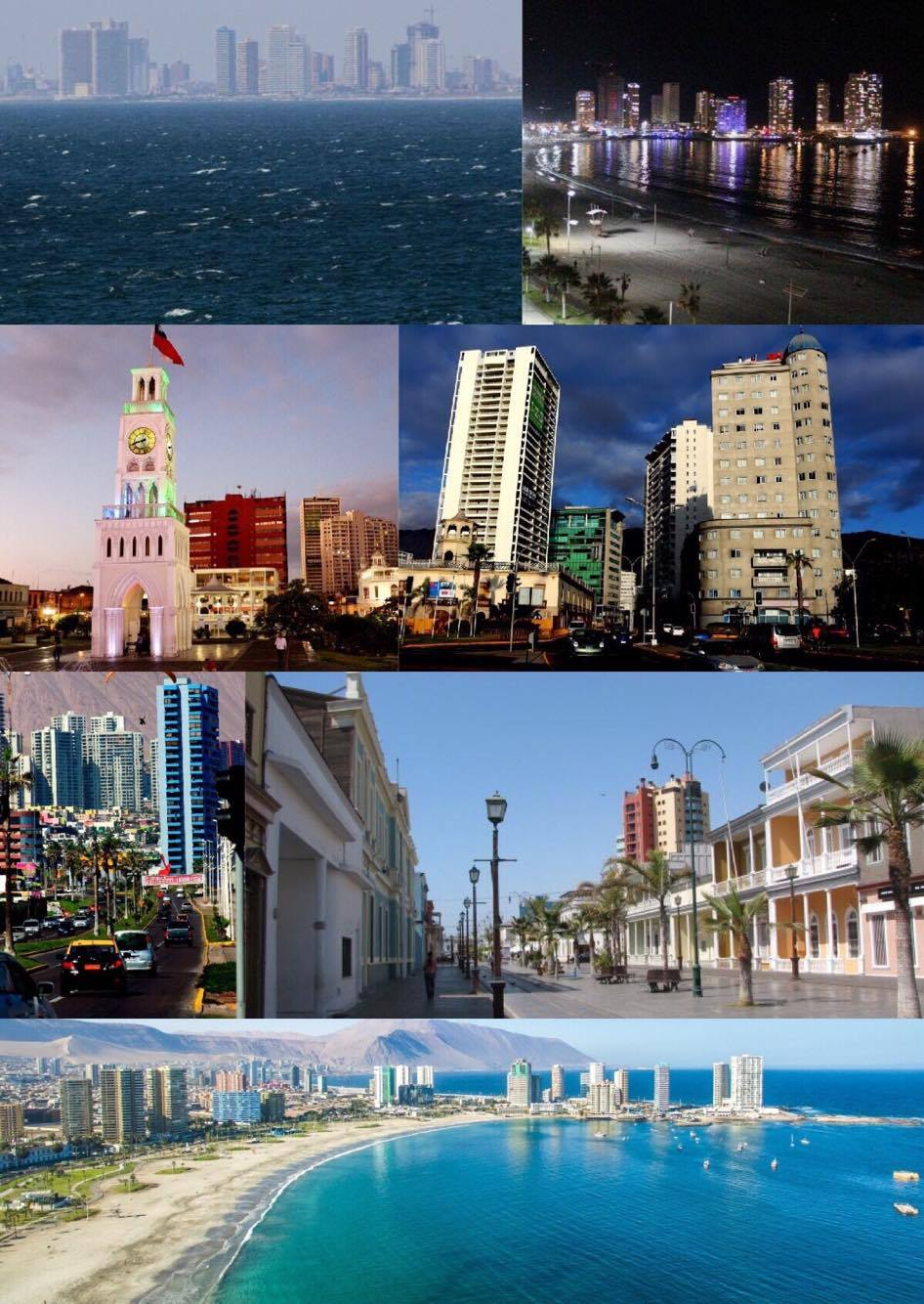 Iquique, Chile 2016.